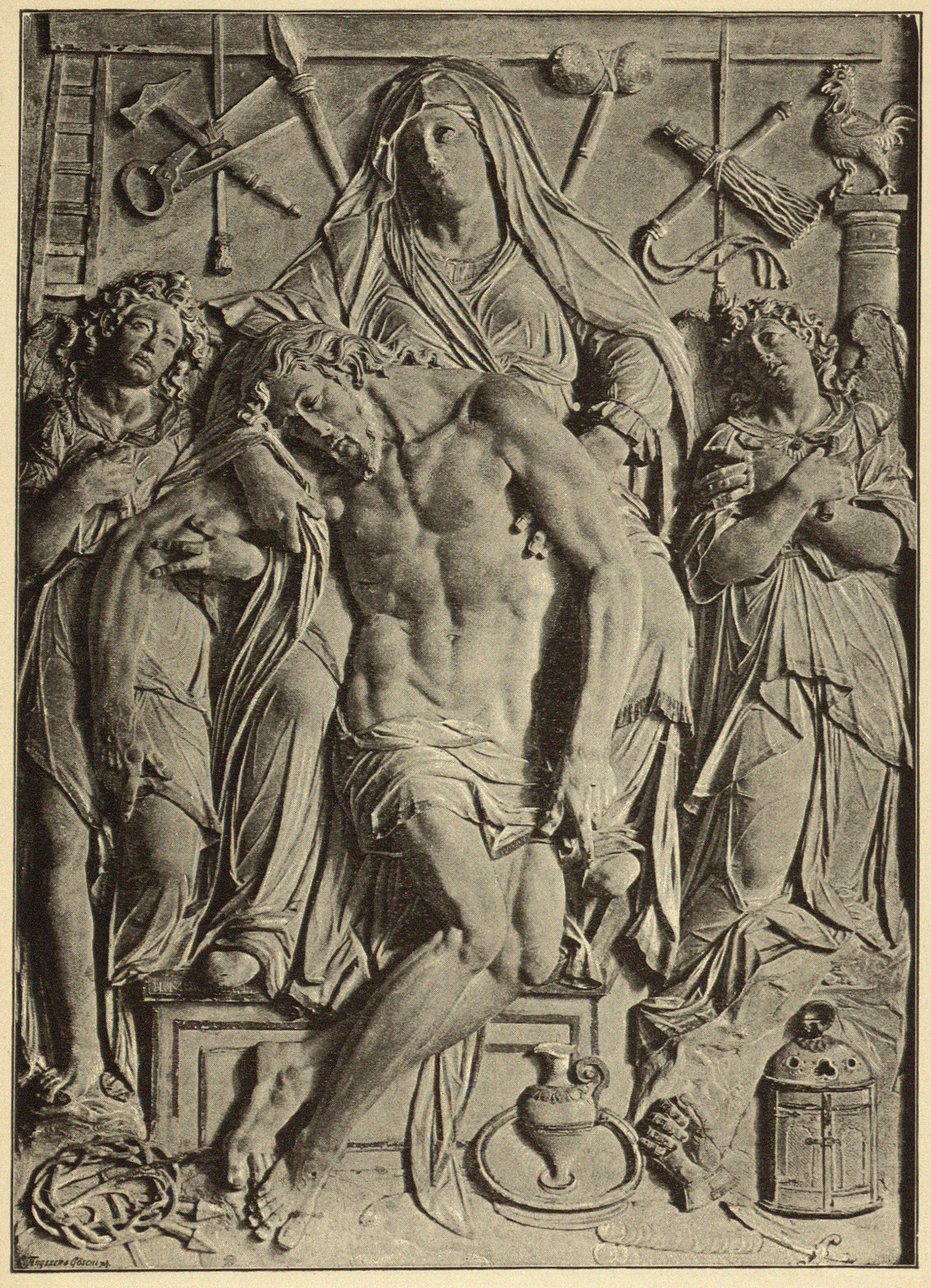 „Schloss Hegne, Pietà von Hans Morlock (jetzt in Karlsruhe)“ (von Hans Morinck, um 1600; ursprünglich in St. Johann, Konstanz, 1819 nach Schloss Hegne gekommen) Abbildung aus: Franz Xaver Kraus: Die Kunstdenkmäler des Grossherzogthums Baden. Band 1: Die Kunstdenkmäler des Kreises Konstanz. Freiburg i. Br. 1887